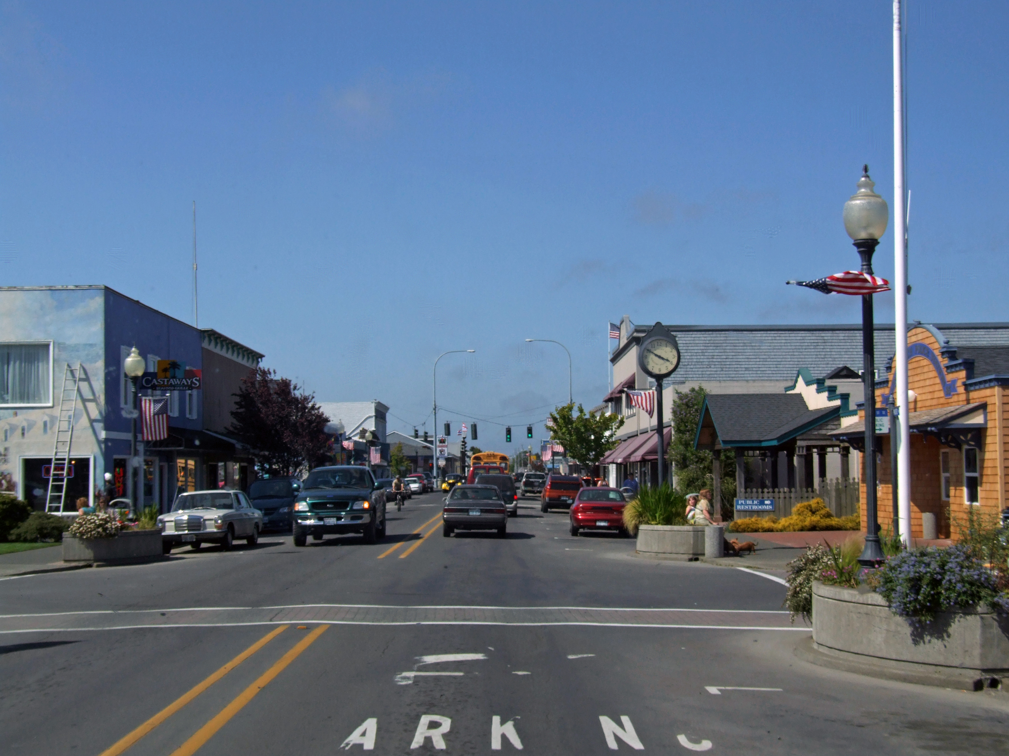 Long Beach, Washington